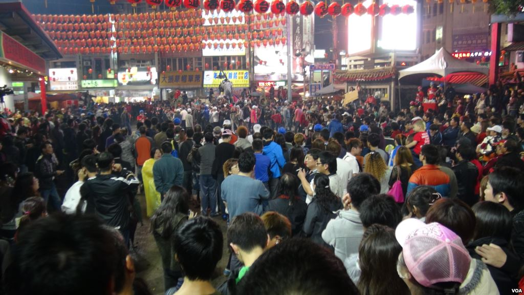 台中大甲鎮瀾宮前迎接媽祖回鑾的民眾